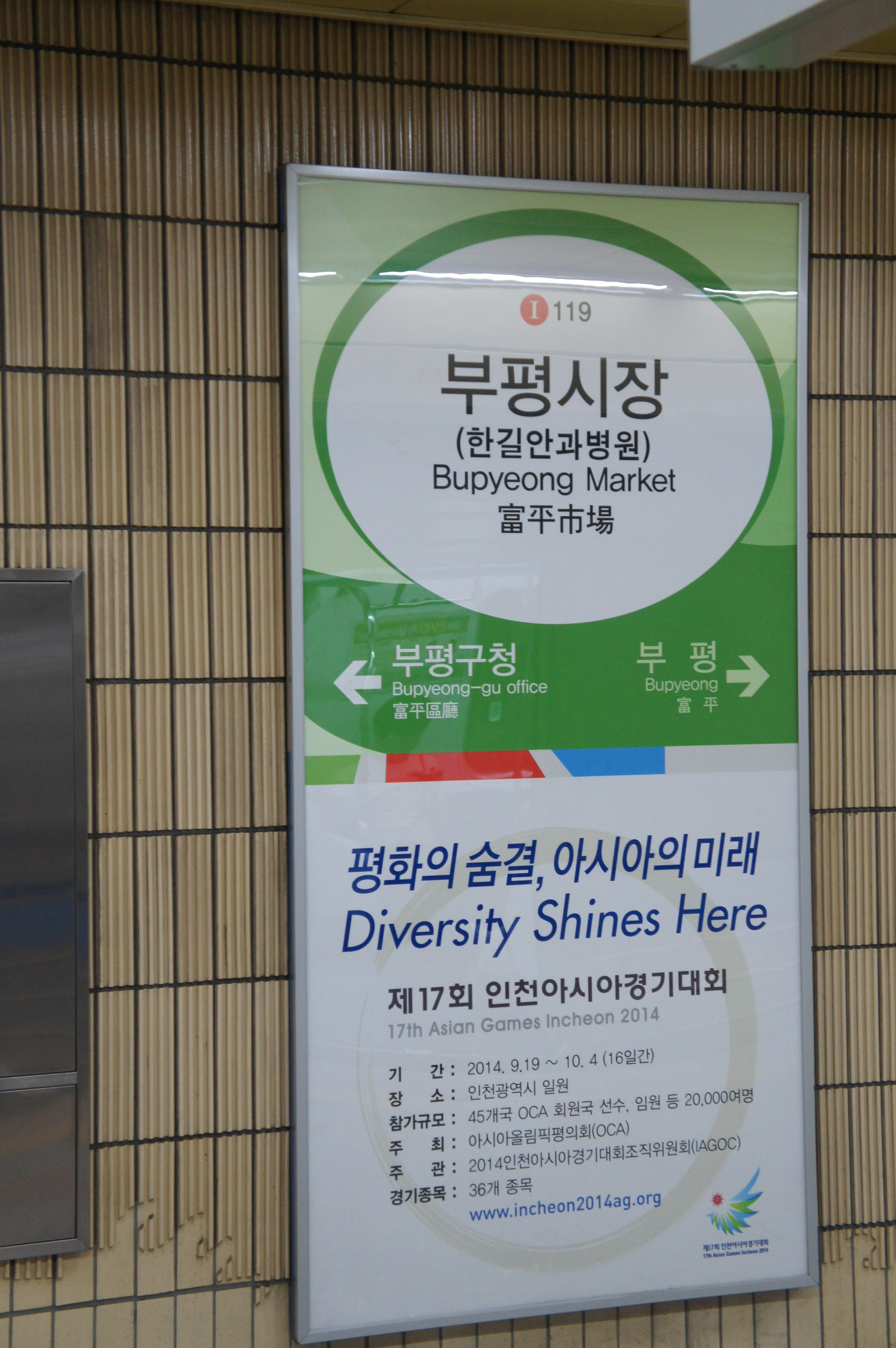 부평시장역 역명판